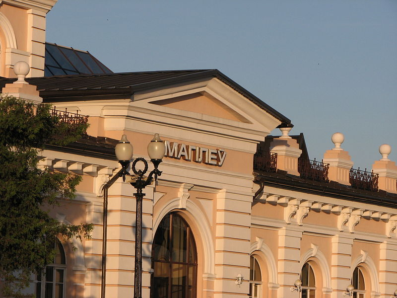 Dworzec kolejowy w Mohylewie